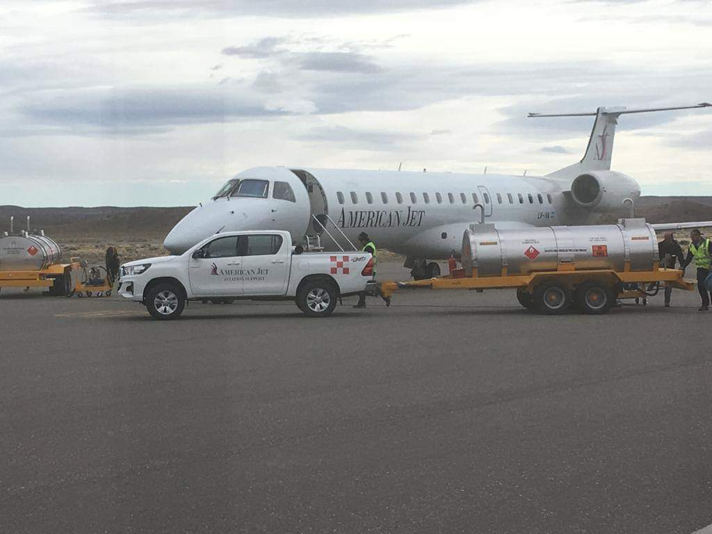 Embraer ERJ 145 American jets Argentina